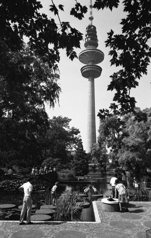 St.S. Hans Jürgen Rohr besucht die Internationale Gartenbau Ausstellung (IGA) in Hamburg